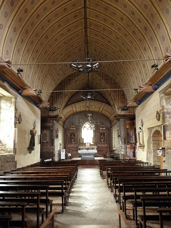 Intérieur de l'église Saint-Pierre de Pleumeleuc (35), avec ses poutres à engoulants.